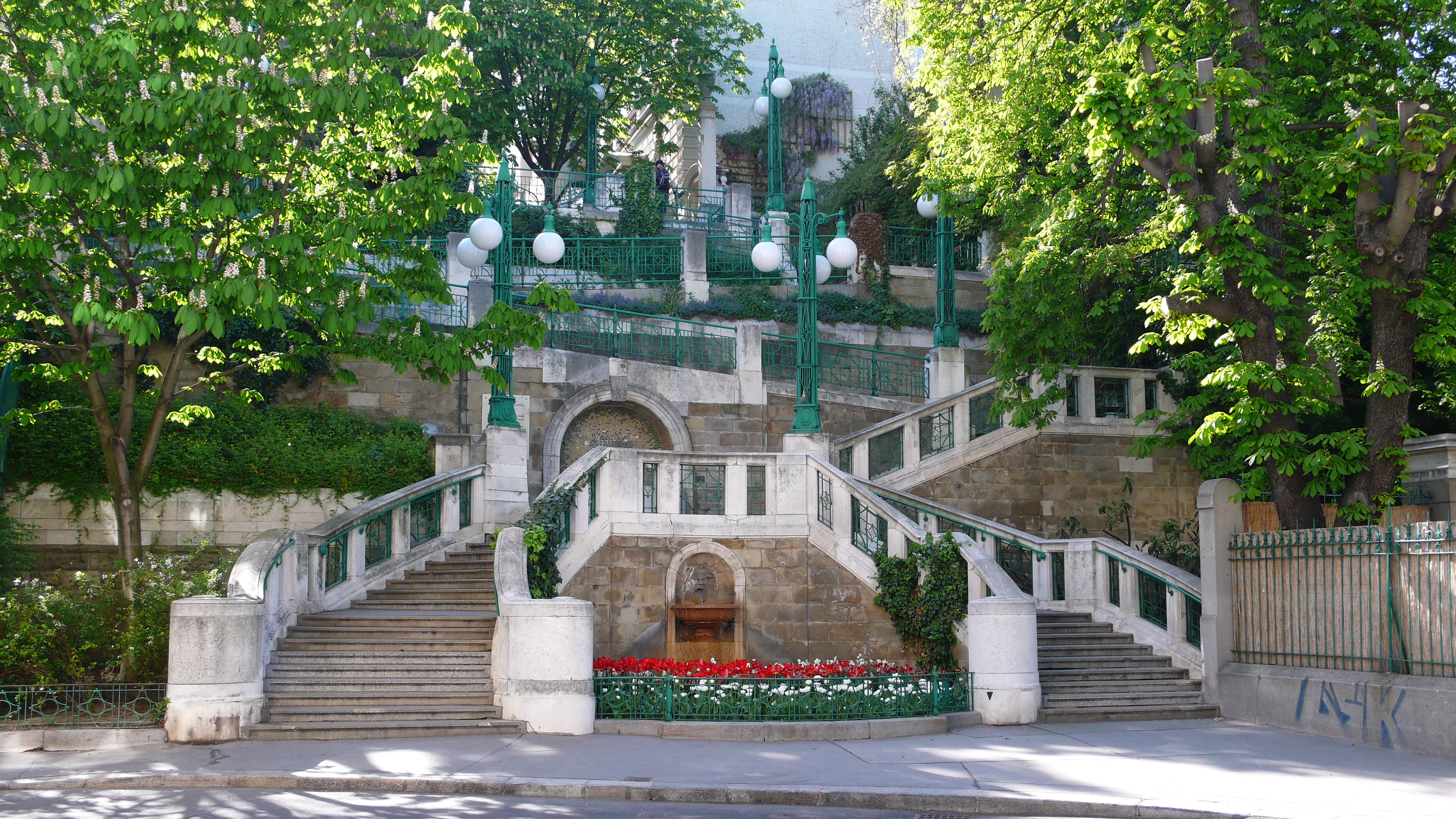 Strudlhofstiege, Wien